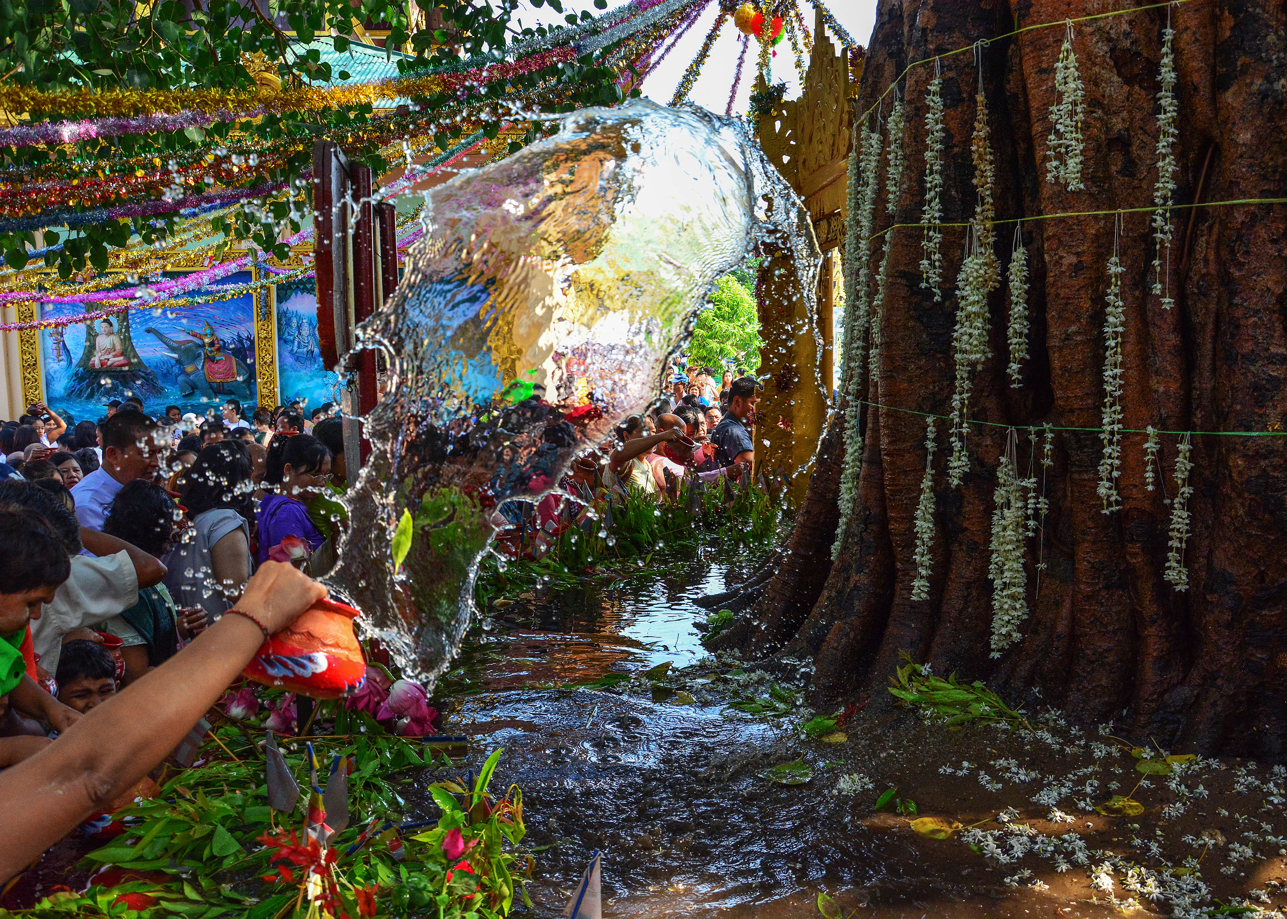 မြန်မာဘာသာ: ညောင်ရေသွန်းပွဲတော်